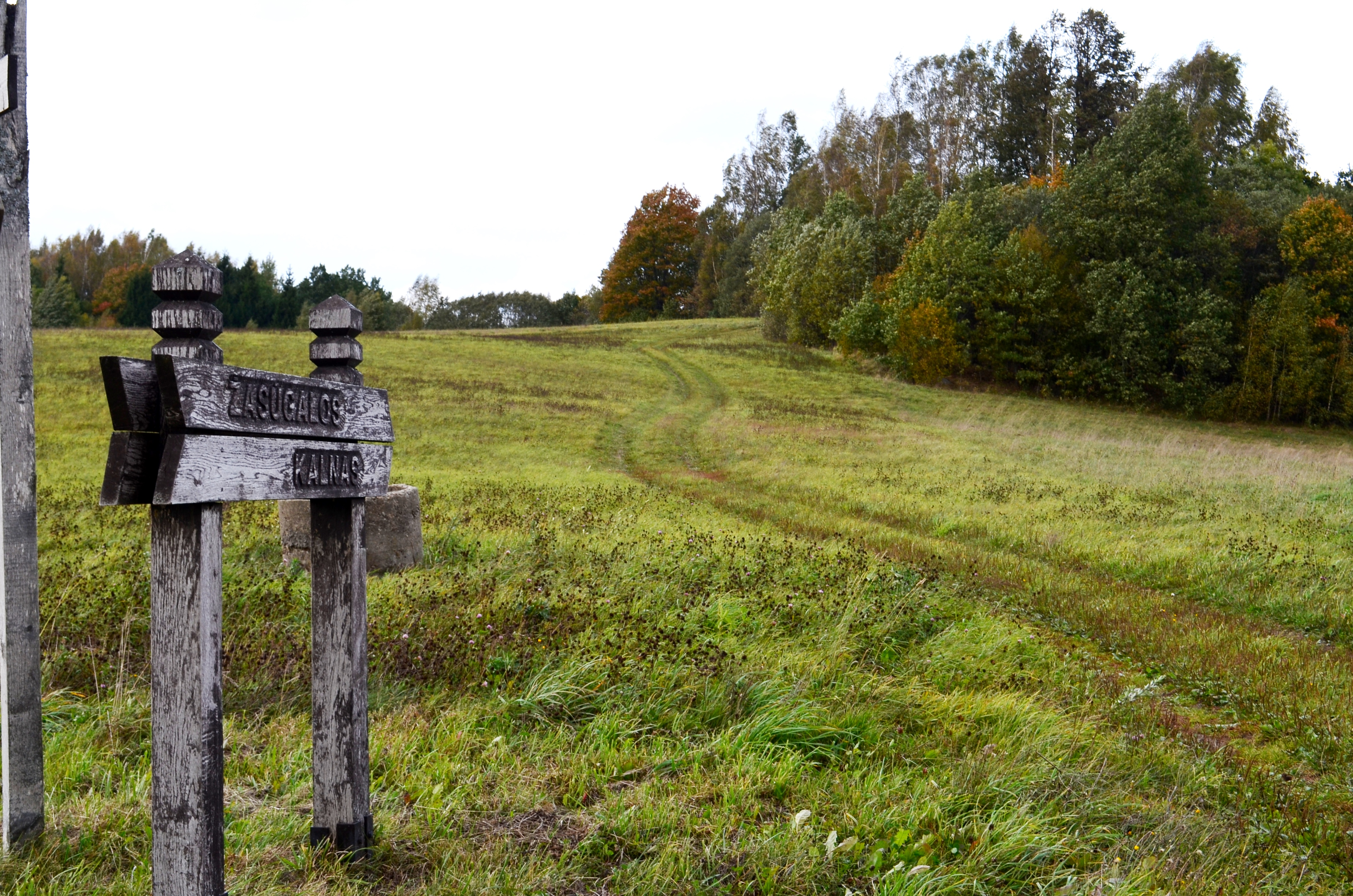 Žąsūgalos kalnas, viršūnė, Telšių raj.